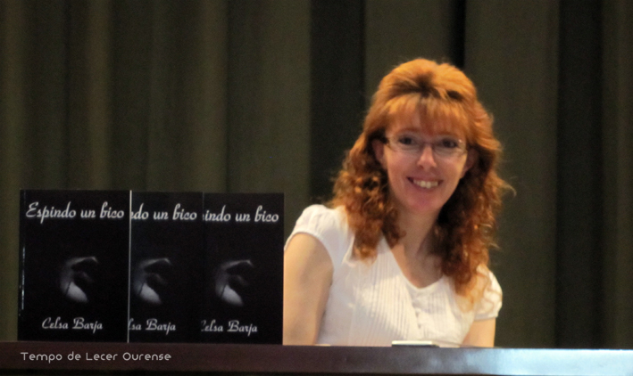 Celsa Barja,escritora, editora, ensayista, poeta Ourensana